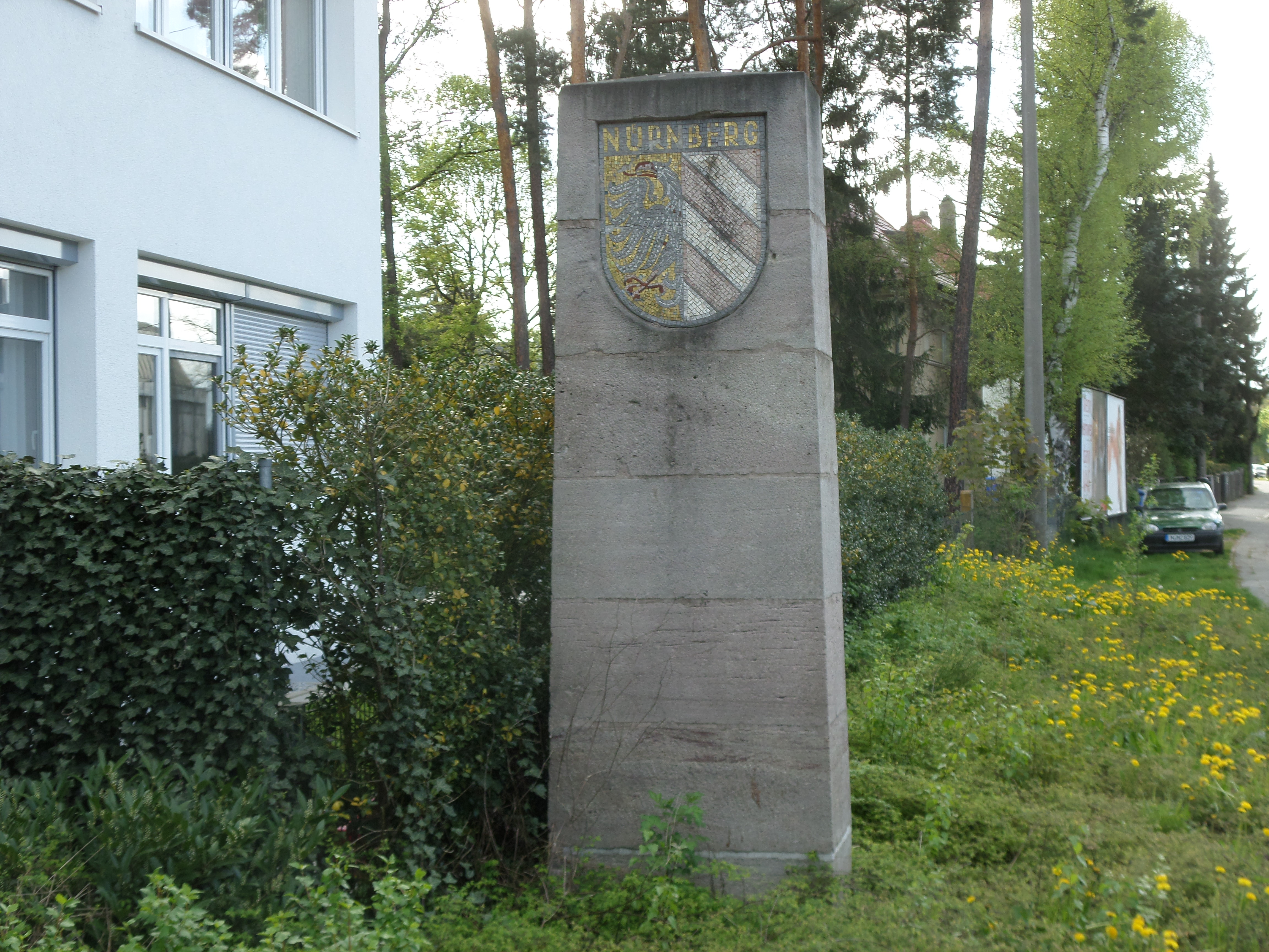 Laufamholzstraße 370 - Grenzstein - Eine von sieben Sandsteinstelen, mit Betonsockel sowie mit der Aufschrift Nürnberg und dem Stadtwappen in farbigem Steinmosaik, 1951 - D-5-64-000-2975